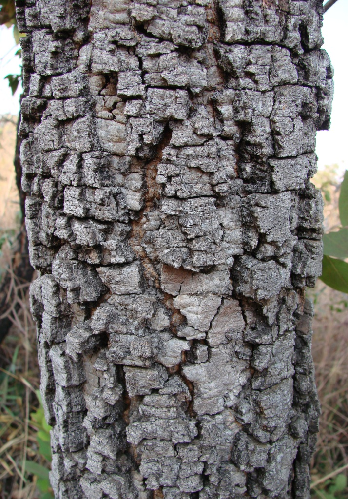 Hymenaea stigonocarpa - FABACEAE Parque Olhos D'Água - Brasília - Distrito Federal - Brasil.